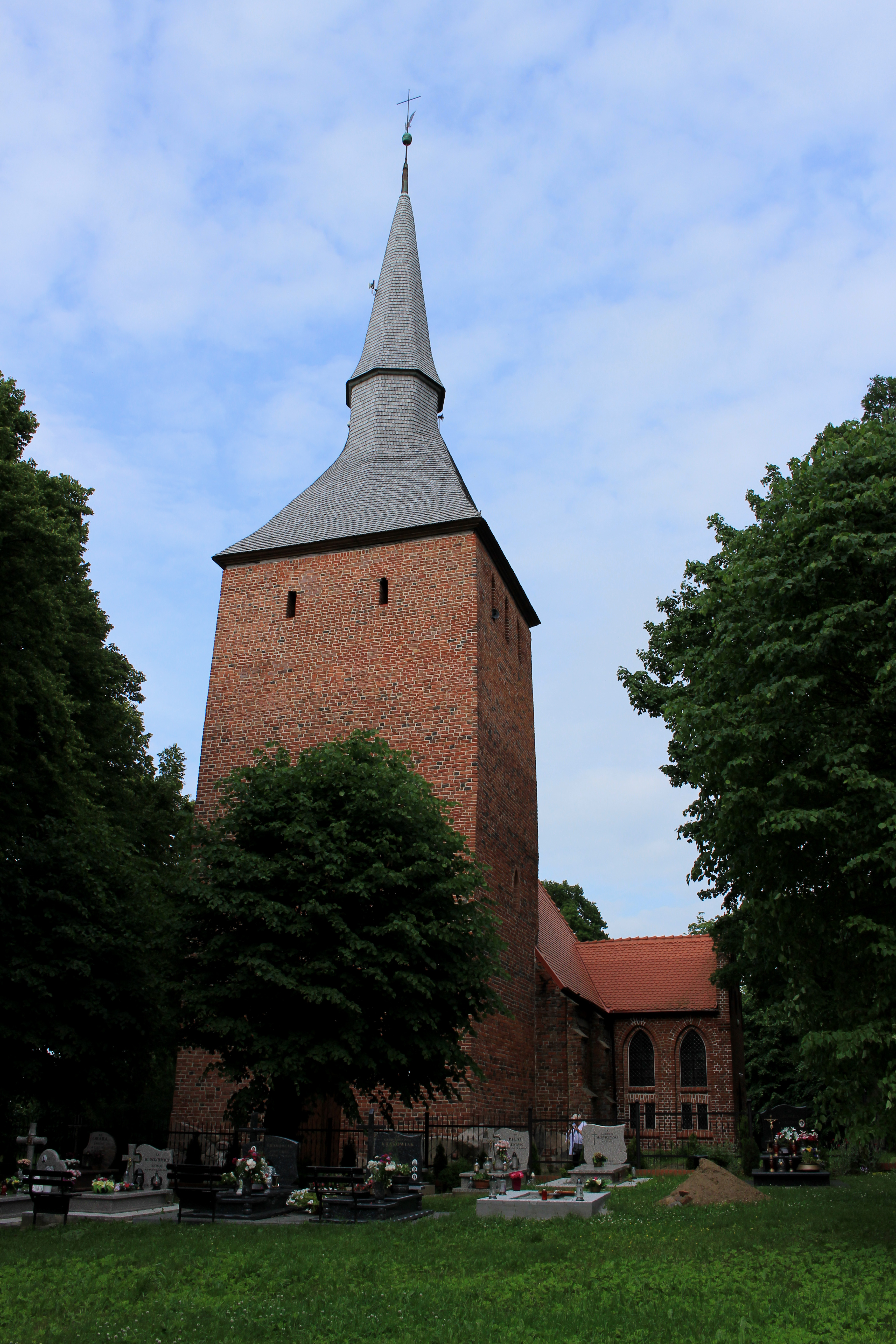 Budynek kościoła widoczny od strony cmentarza